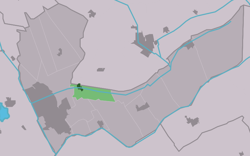 Kaartsje fan himrik fan De Knipe